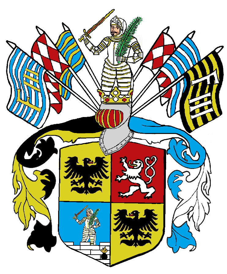 erb Václava Mořice Salomona von Friedberg, včetně klenotu